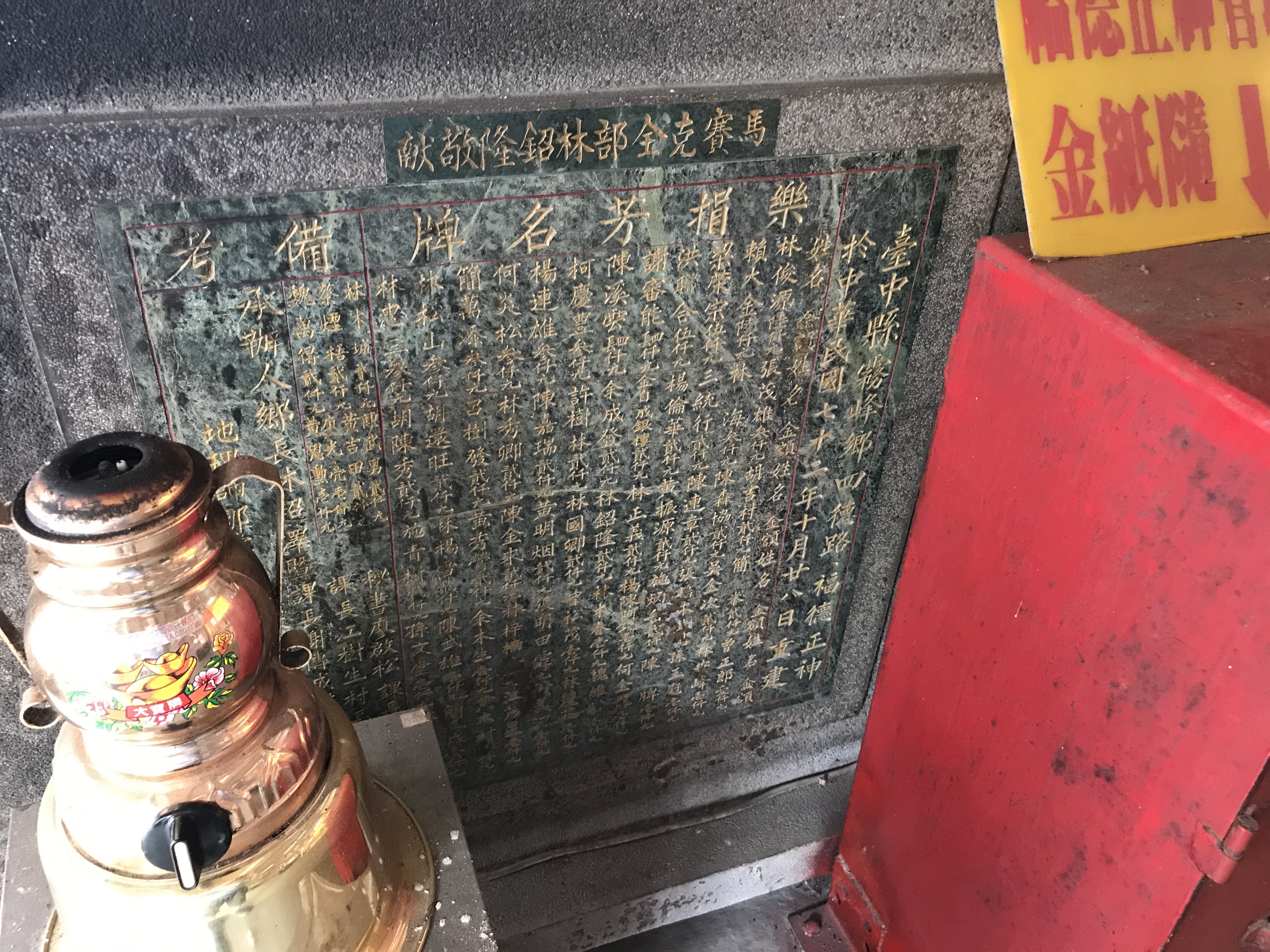 中文（台灣）: 阿罩霧福德祠樂捐芳名牌